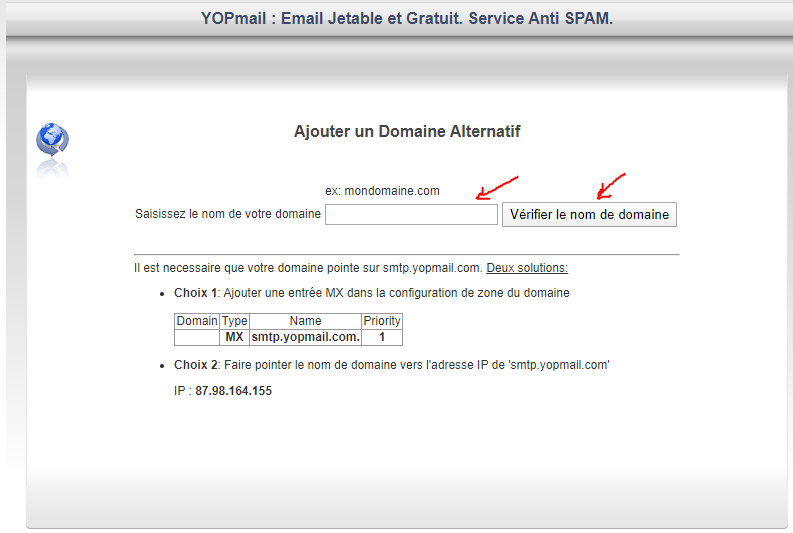 description de l'ajout d'un domaine alternatif chez yopmail